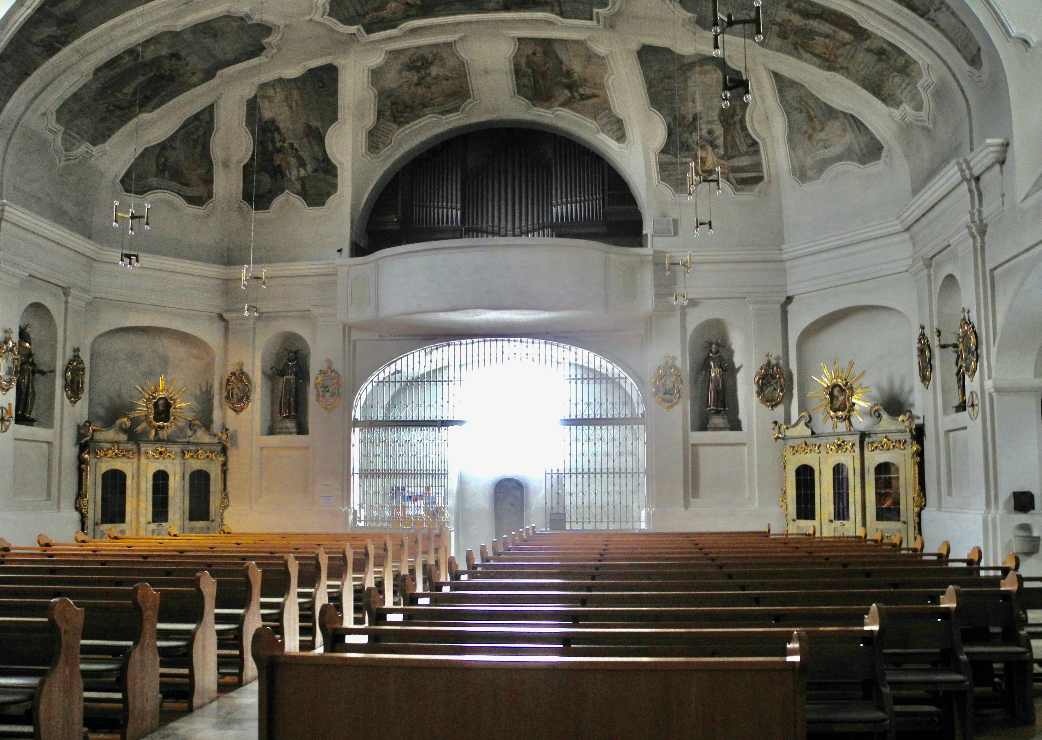 Hirnschrodt von 1957 (16/II/P).